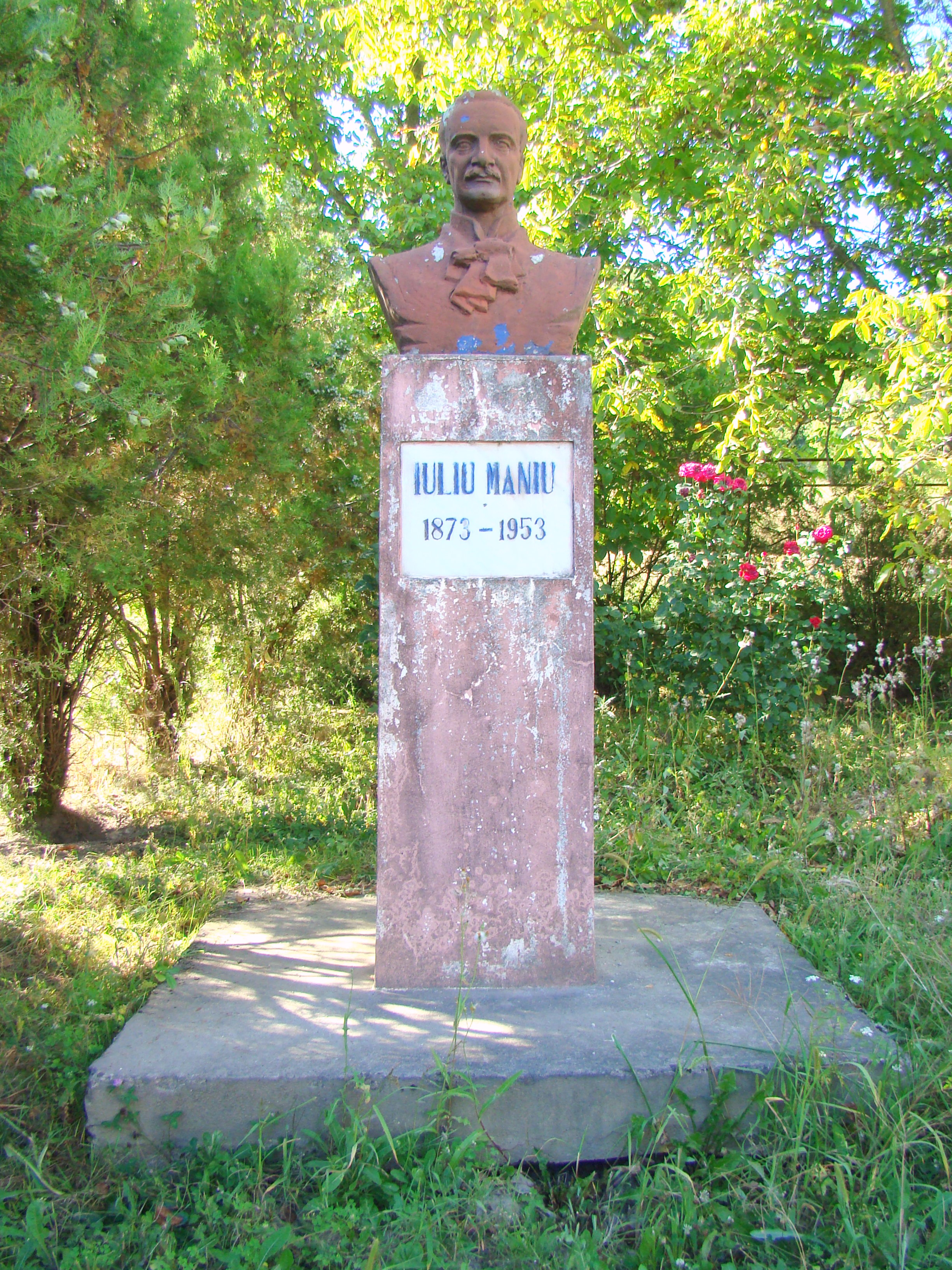 Casa memorială „Iuliu Maniu”, sat Bădăcin; comuna Pericei